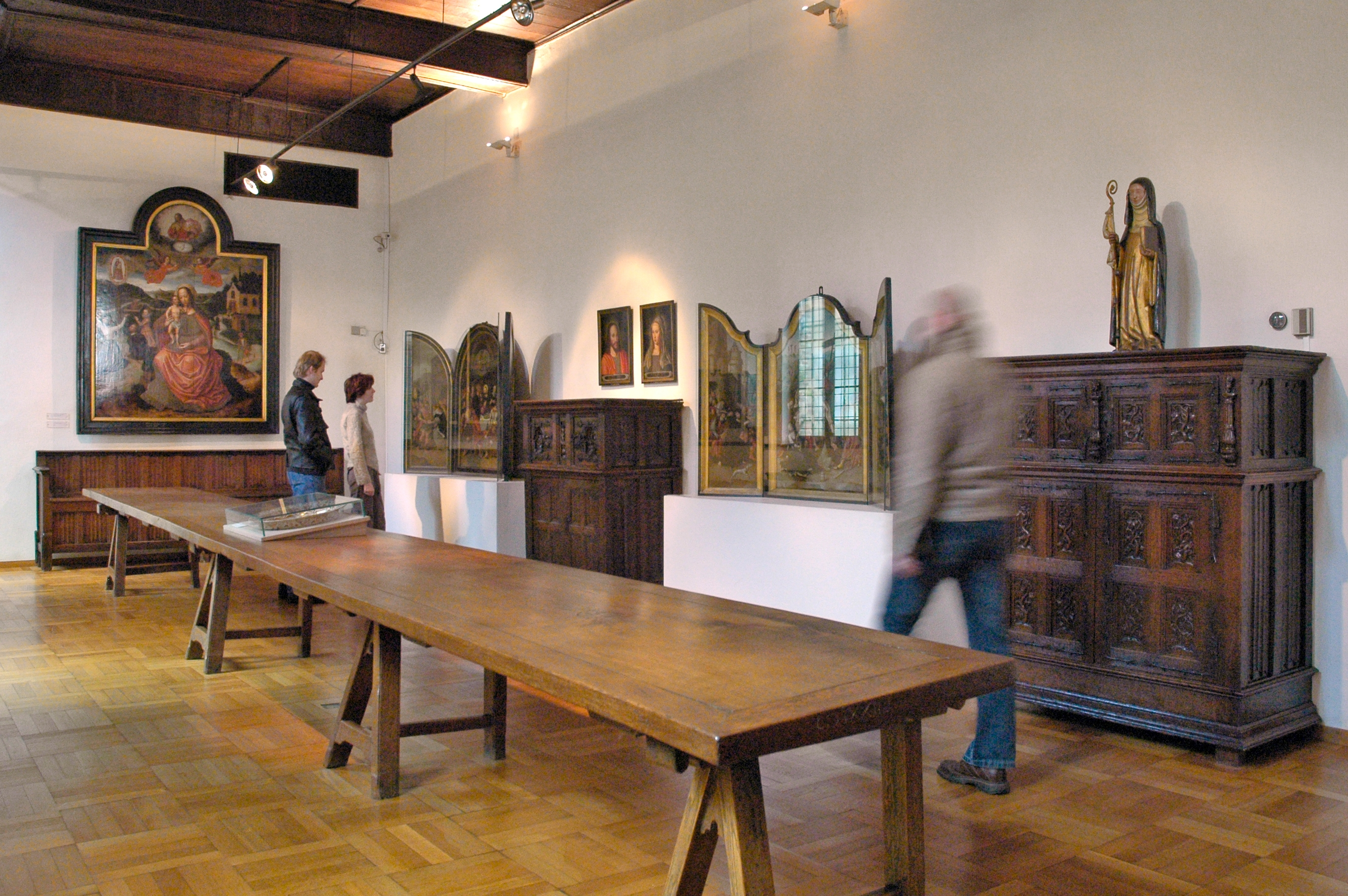 Onze Lieve Vrouw ter Potterie, grote ziekenzaal, Brugge